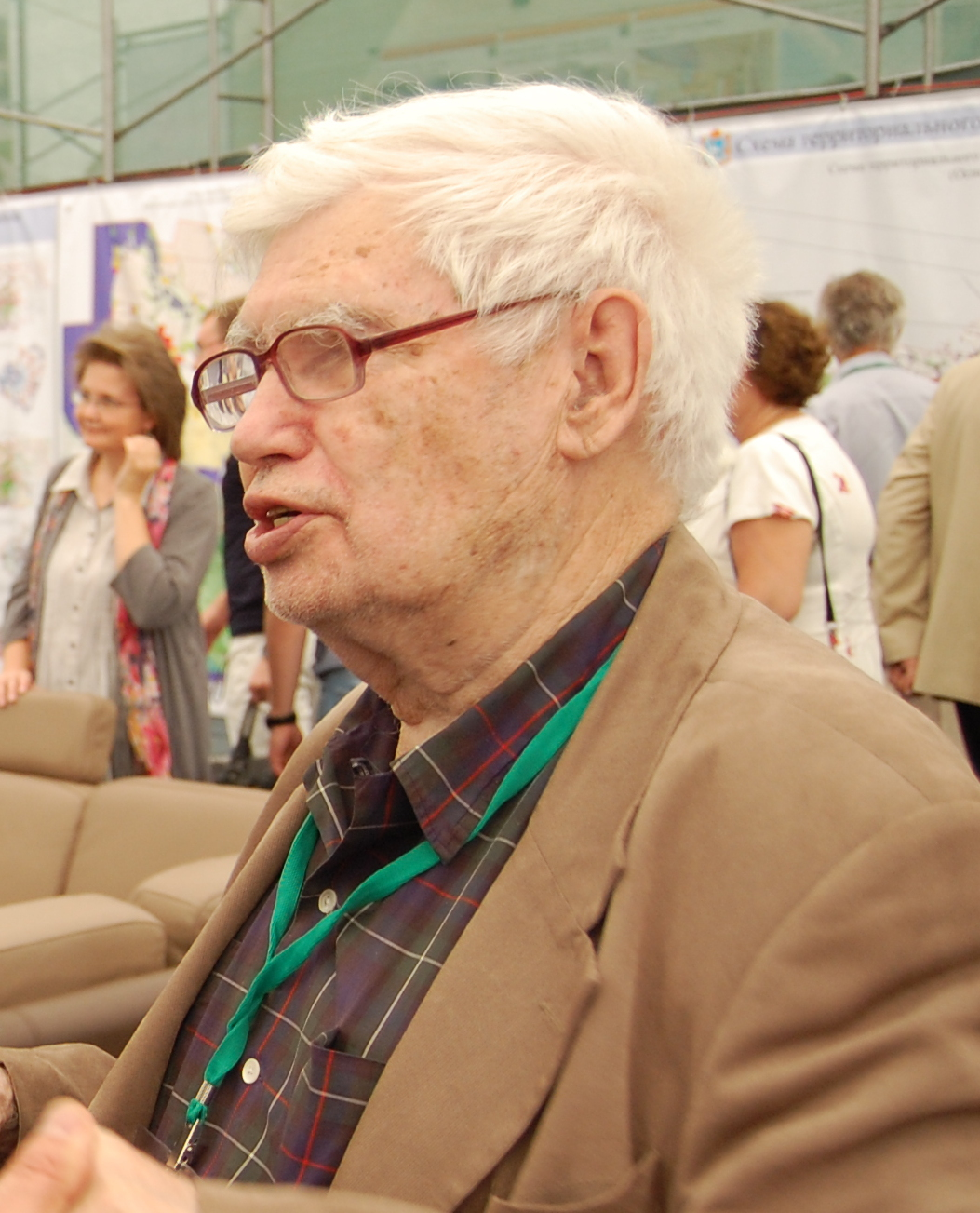 Юрий Петрович Бочаров, Академик РААСН, Отделение градостроительства. Поволжский фестиваль архитектуры и дизайна в Тольятти - 2012